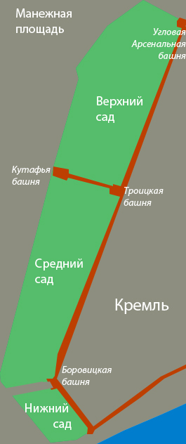 Александровский сад